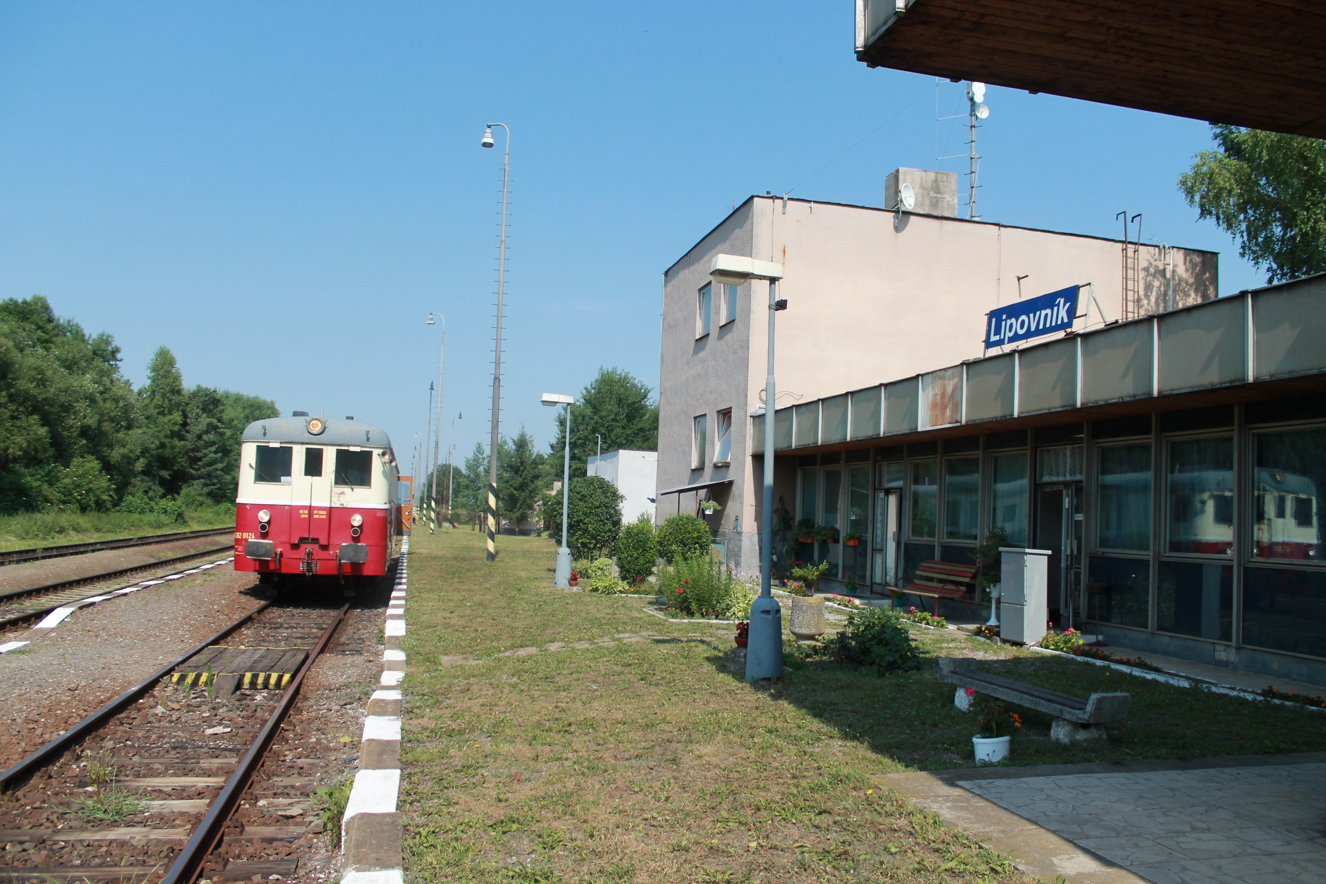 Lipovník železniční stanice a M262.0124